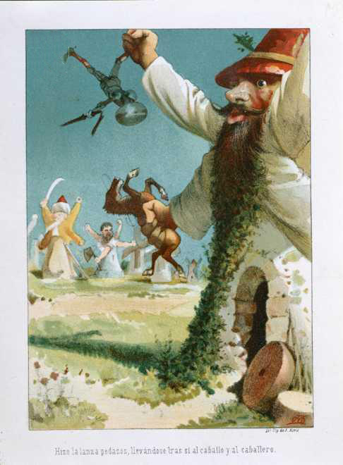 Ilustración de Don Quijote de la Mancha (1879).